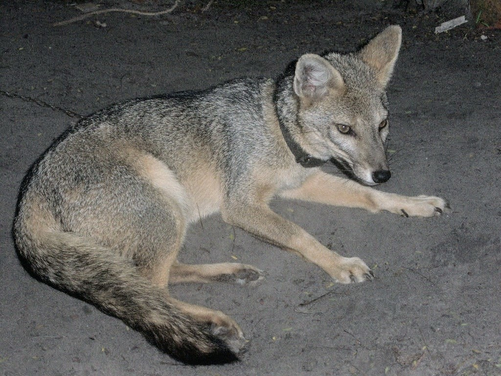 Hoaryrev (Lycalopex vetulus)